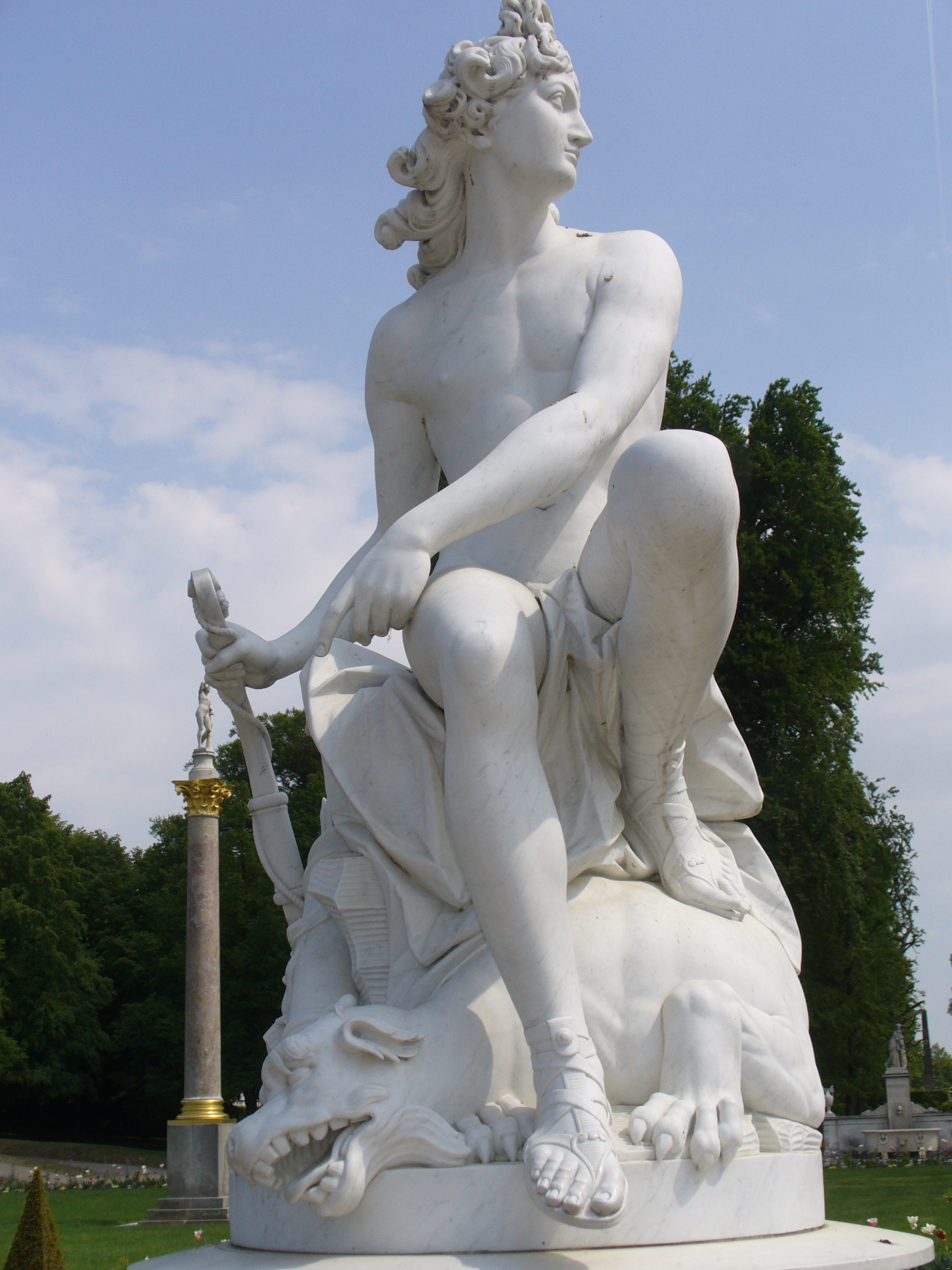 Apollo mit dem getöteten Python(1752)-François Gaspard Adam-Große Fontäne-Sanssouci